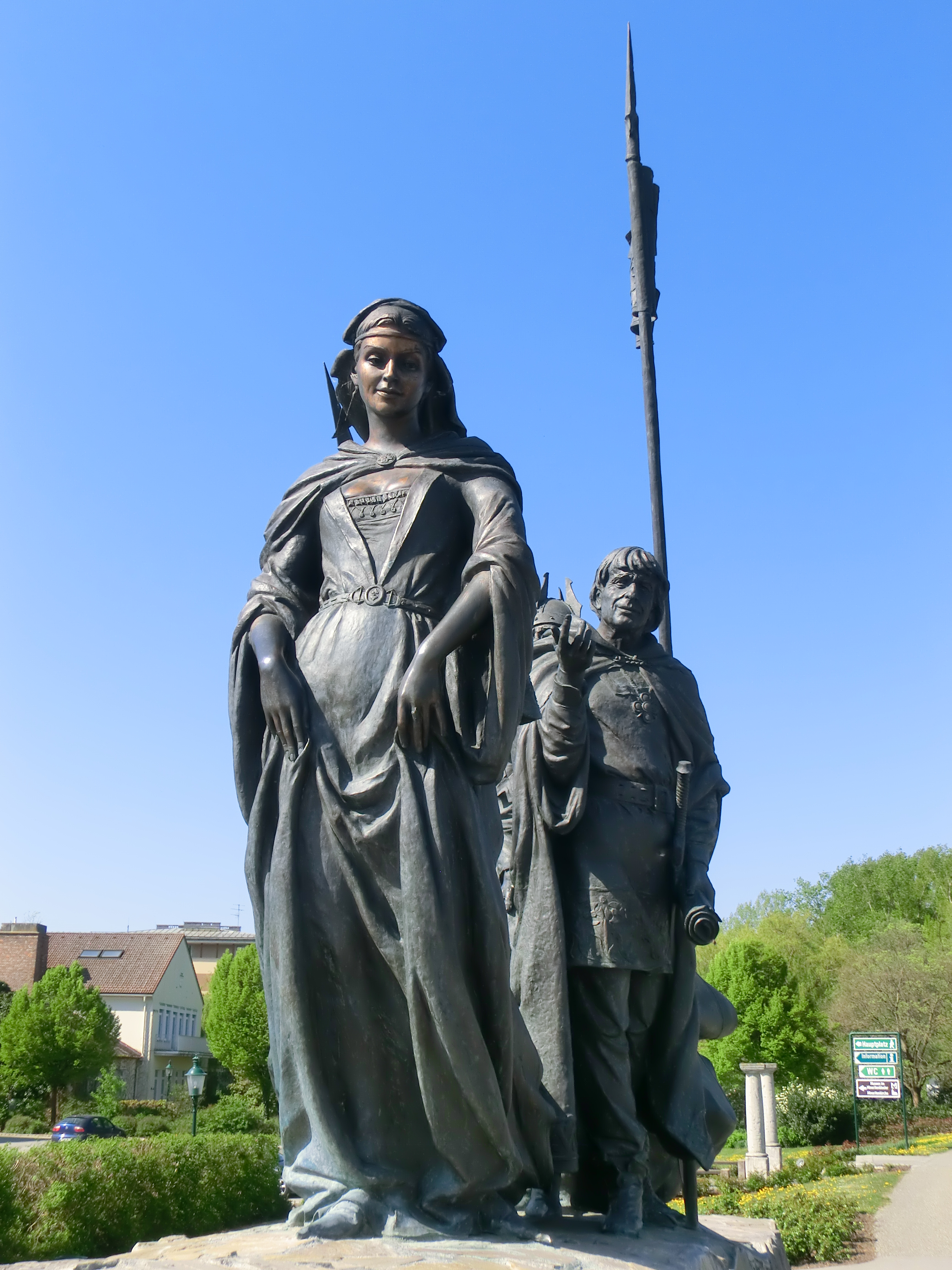 vom Nibelungendenkmal